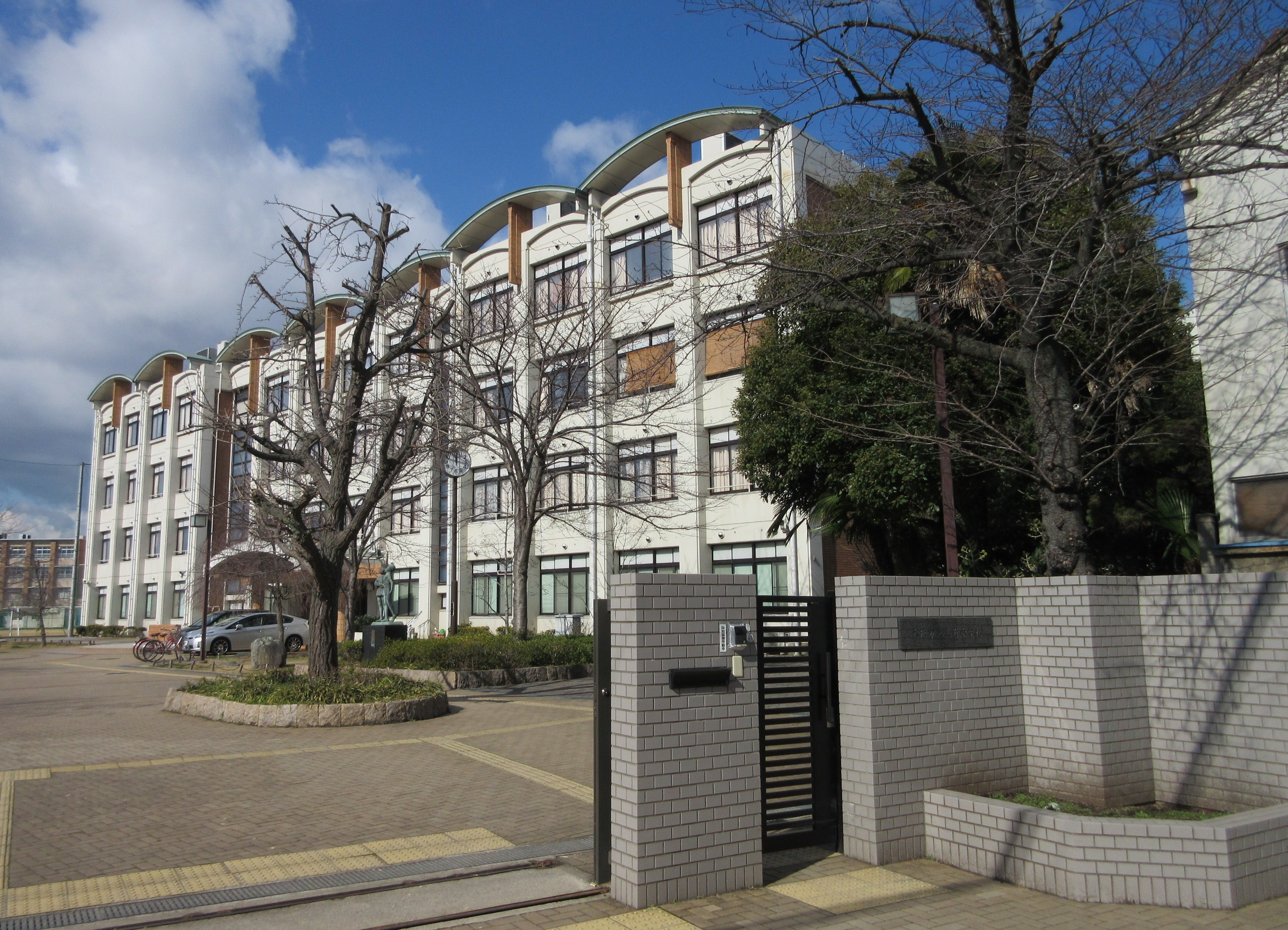 大阪市立生野中学校